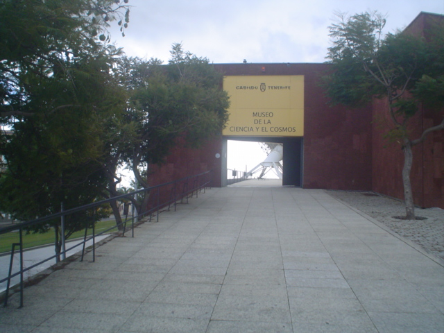 Museo de La Ciencias y el Cosmos